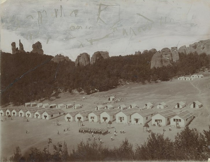 Лагера на Петнадесети пехотен ломски полк край Белоградчик